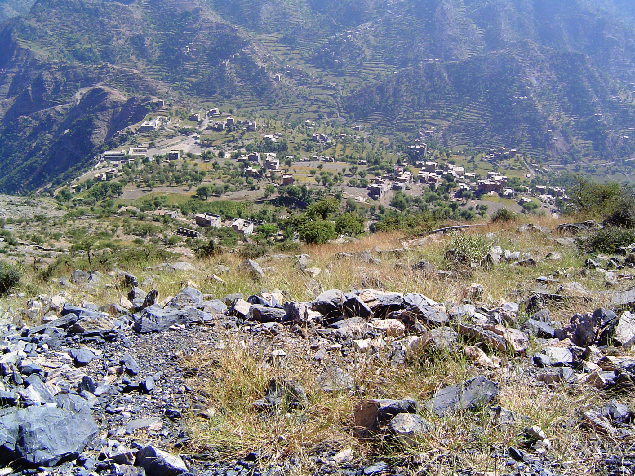 Mirab And Sharab